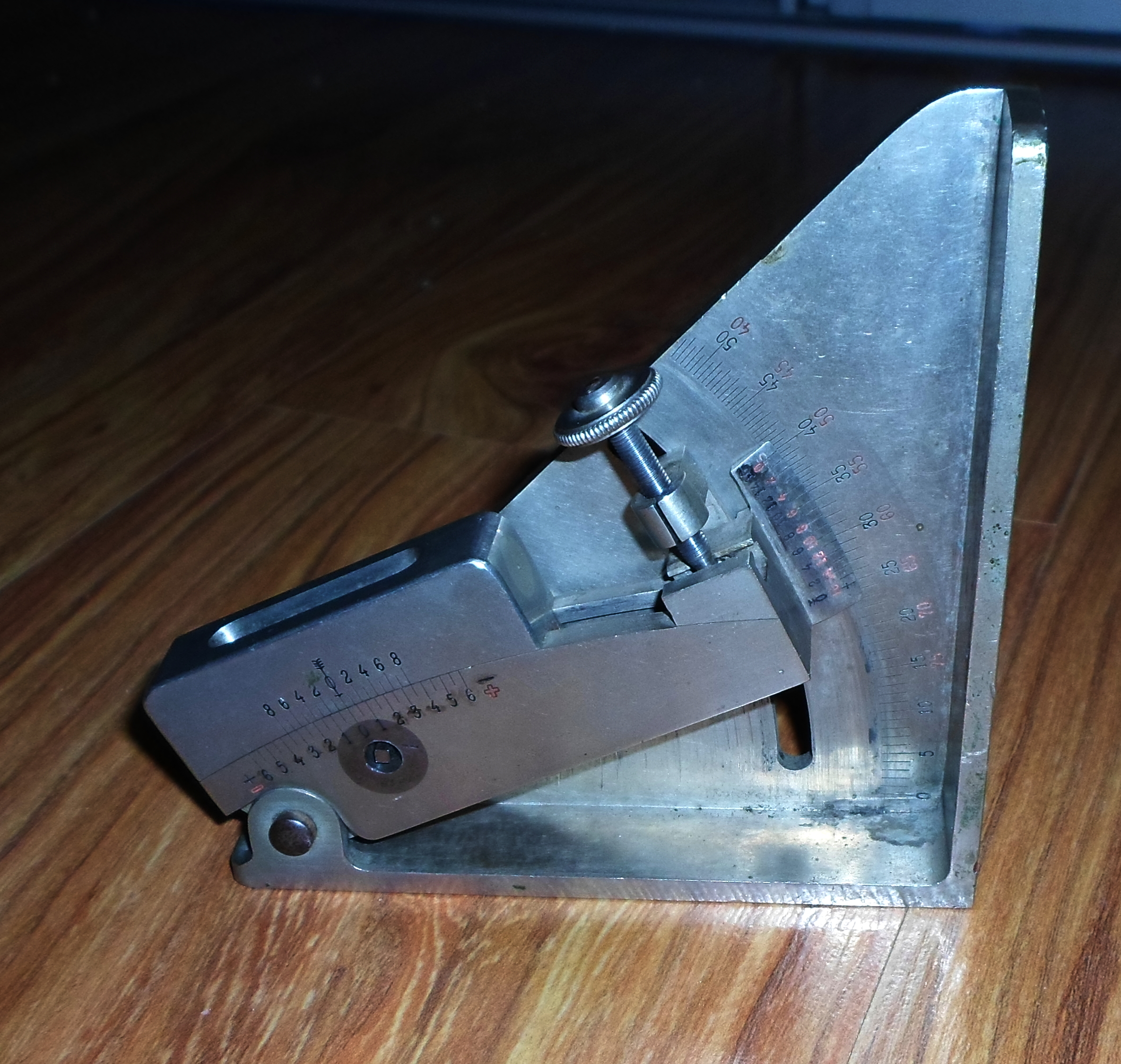 Kwadrant WM 35, fot. G. Framski